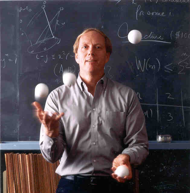 Ronald Graham juggling